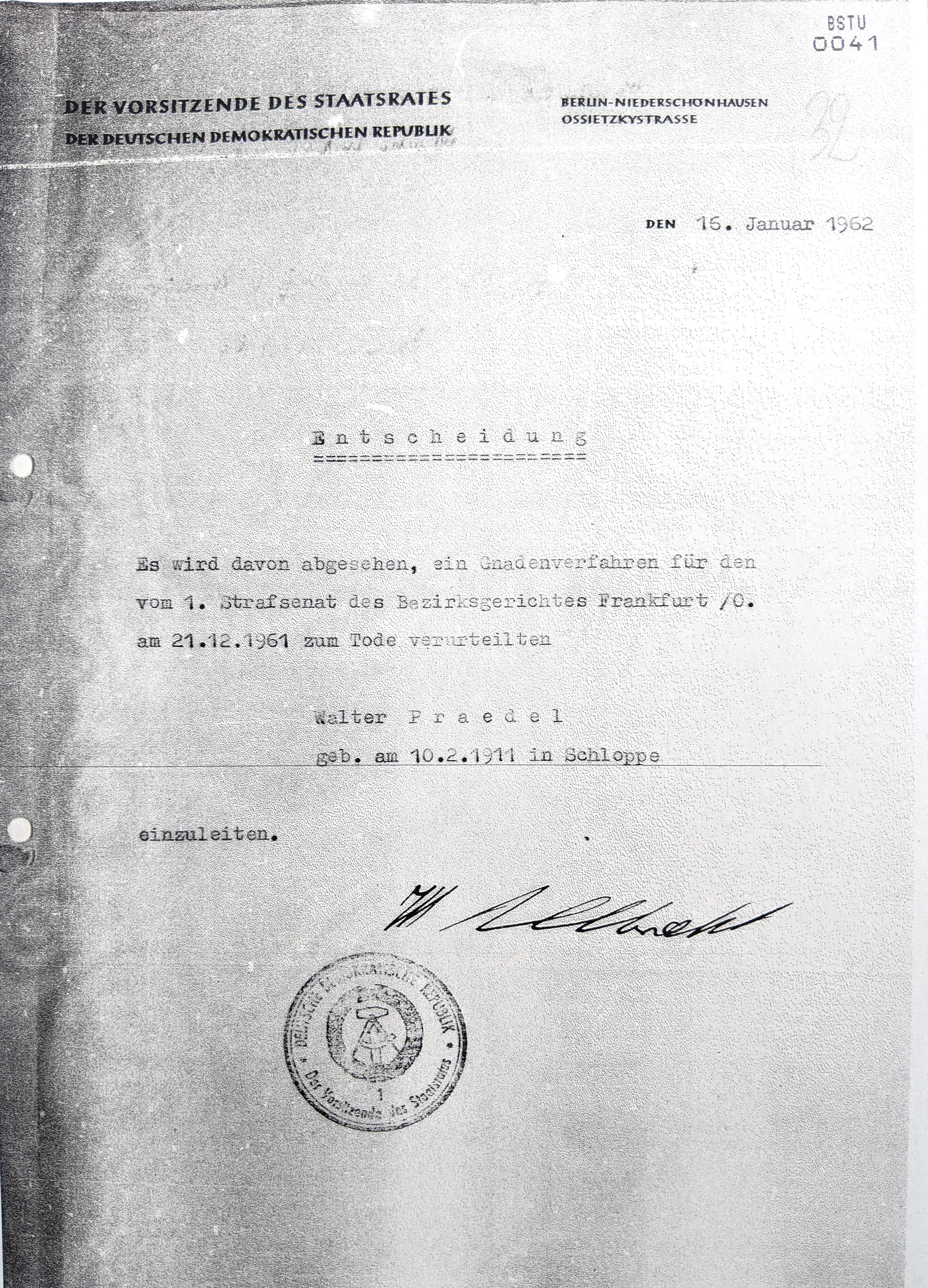 Walter Praedel – Walter Ulbricht lehnt Gnadengesuch ab – 1962